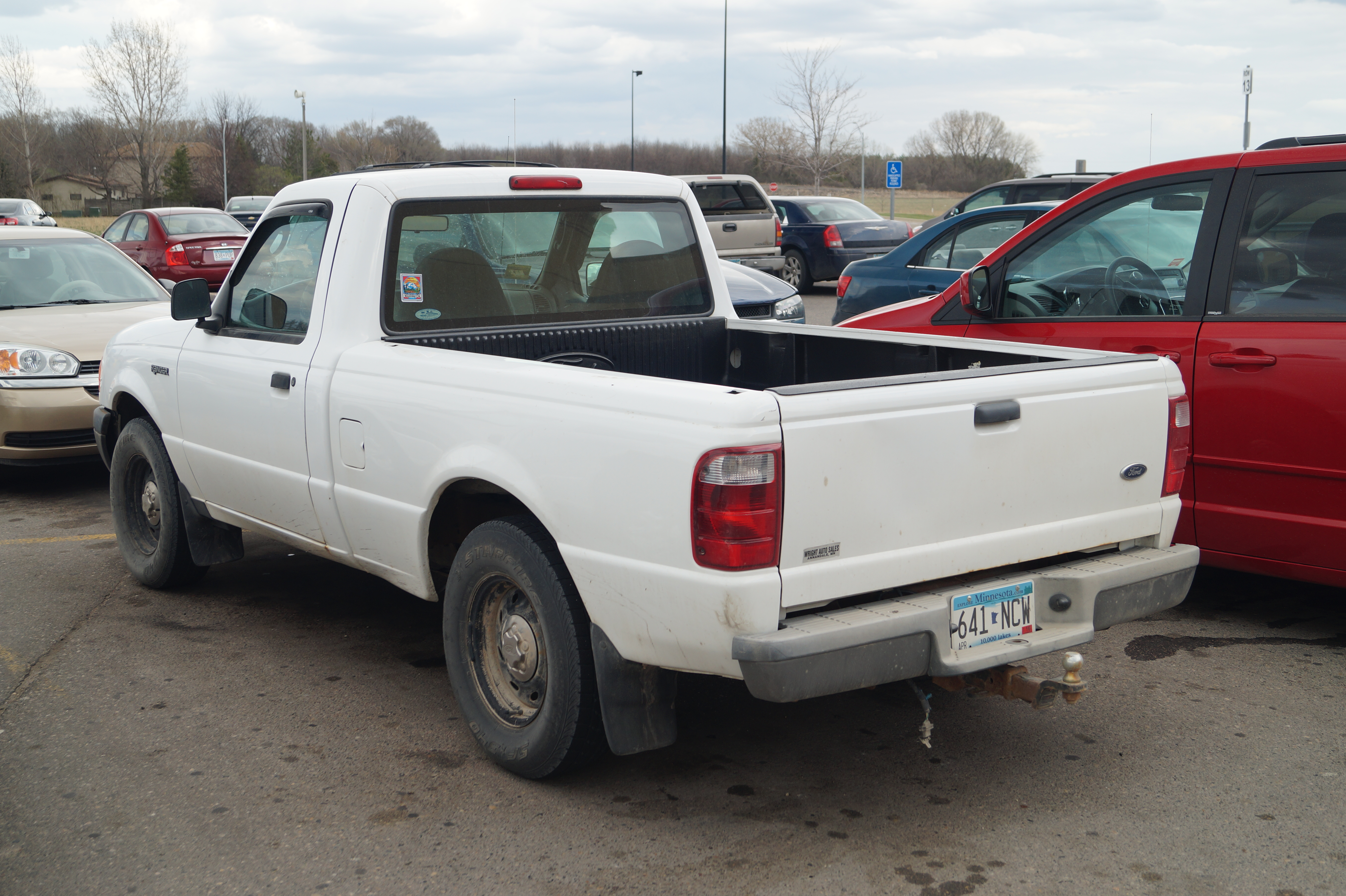 2003 Ford Ranger & 1997 Mazda B2300 Pick-Up